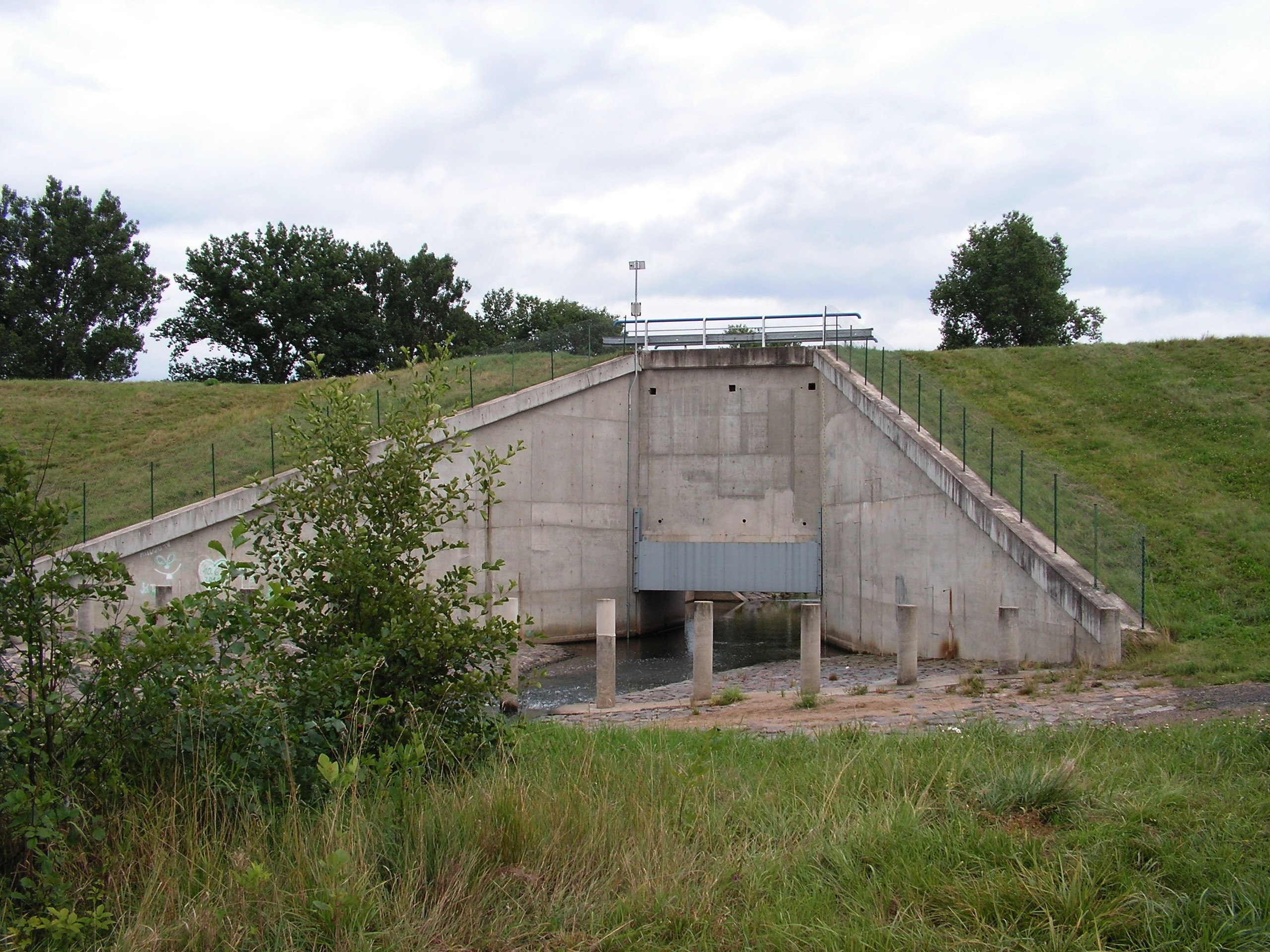 Stabilizované předpolí a vlastní objekt základové výpusti